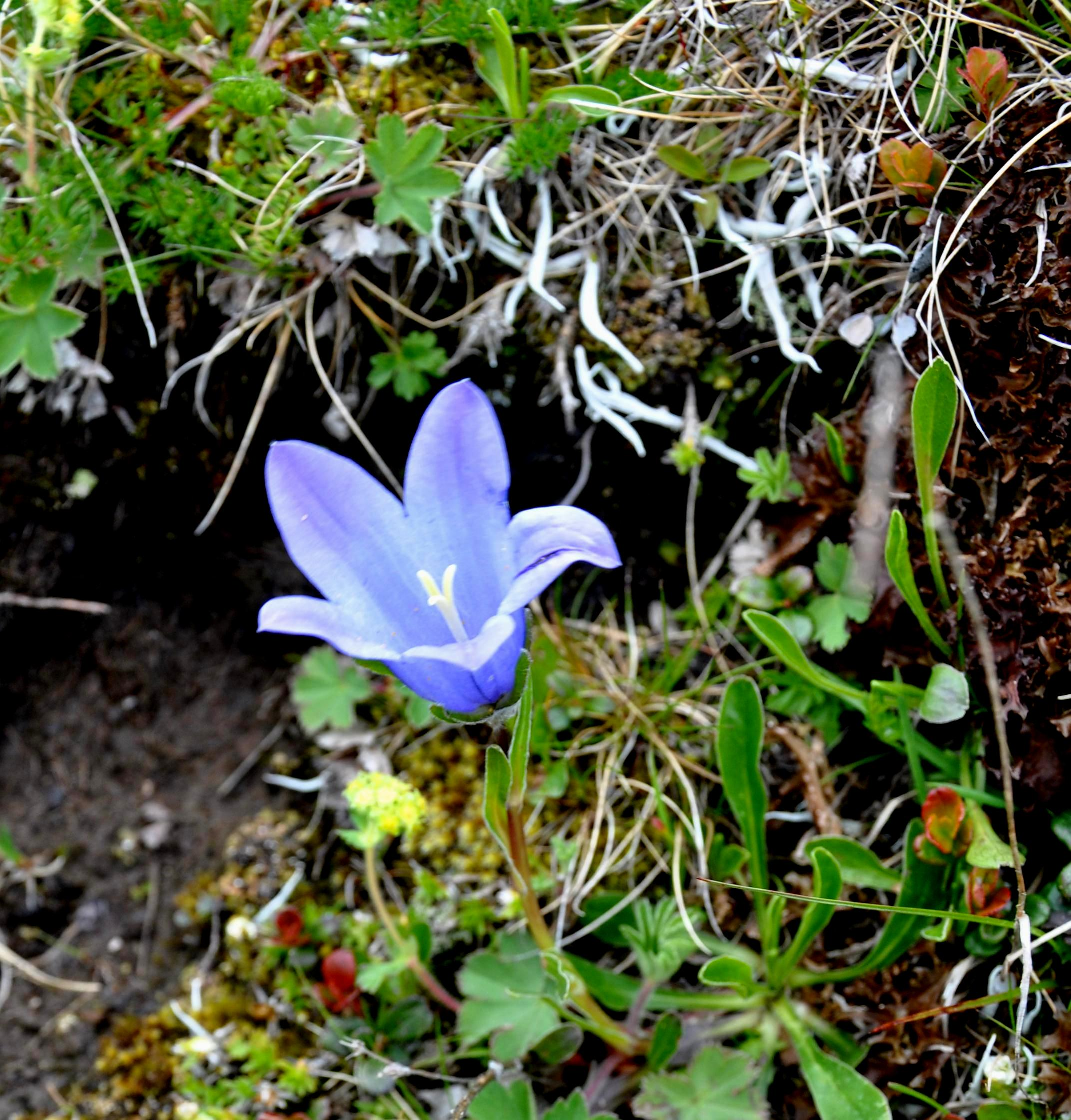 გადაღებულია დათვისჯვრის უღელტეხილზე